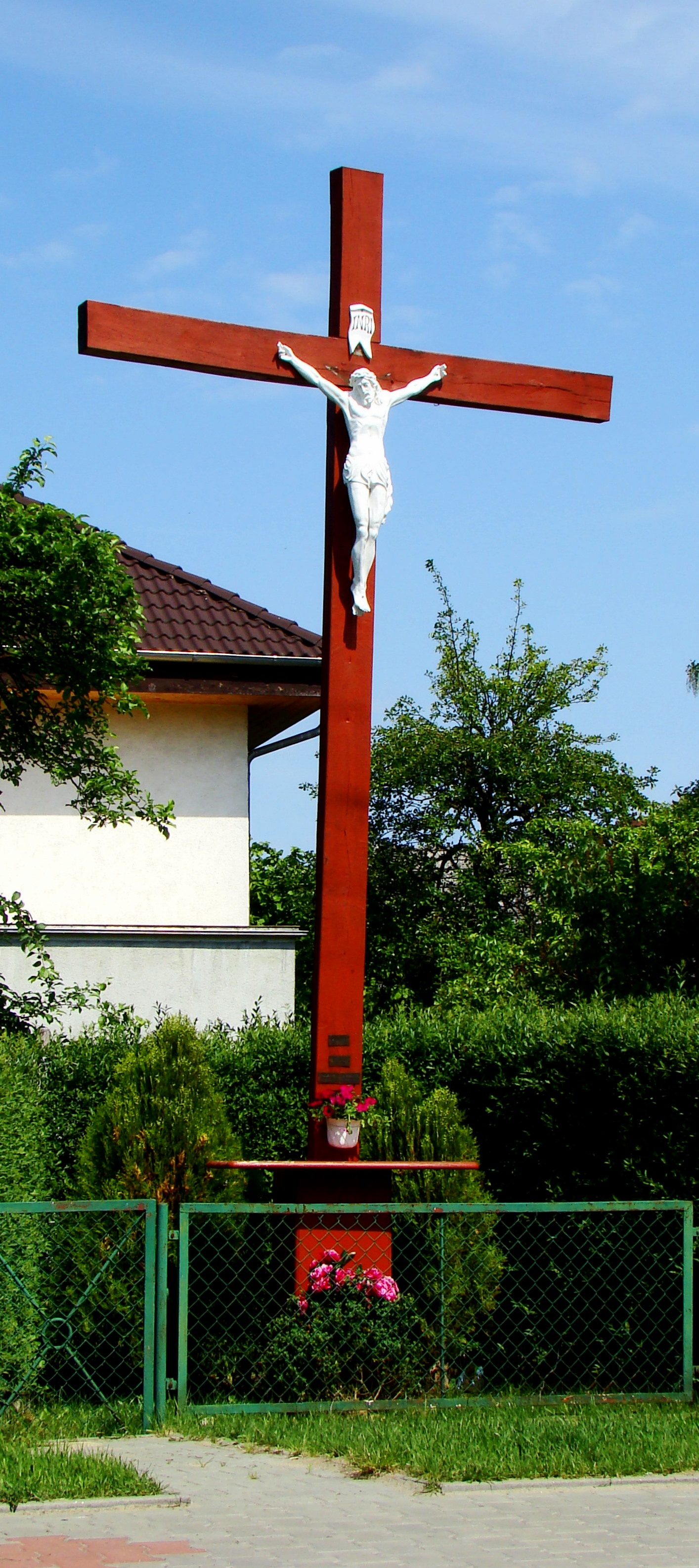 Trzebież, przydrożny krzyż we wsi, (Gmina Police, Powiat policki, Województwo zachodniopomorskie), Polska